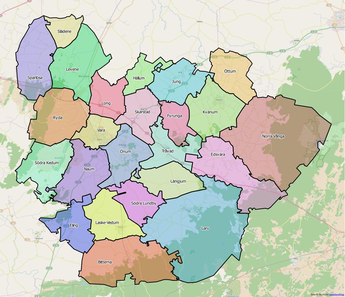 Distriktsindelningen i Vara kommun World file: 62.97201149666705788 0 0 -62.97201149666705788 1420488.90545617090538144 8052494.826539964415133